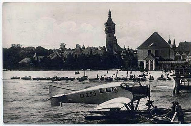 Wodnosamolot w Sopocie